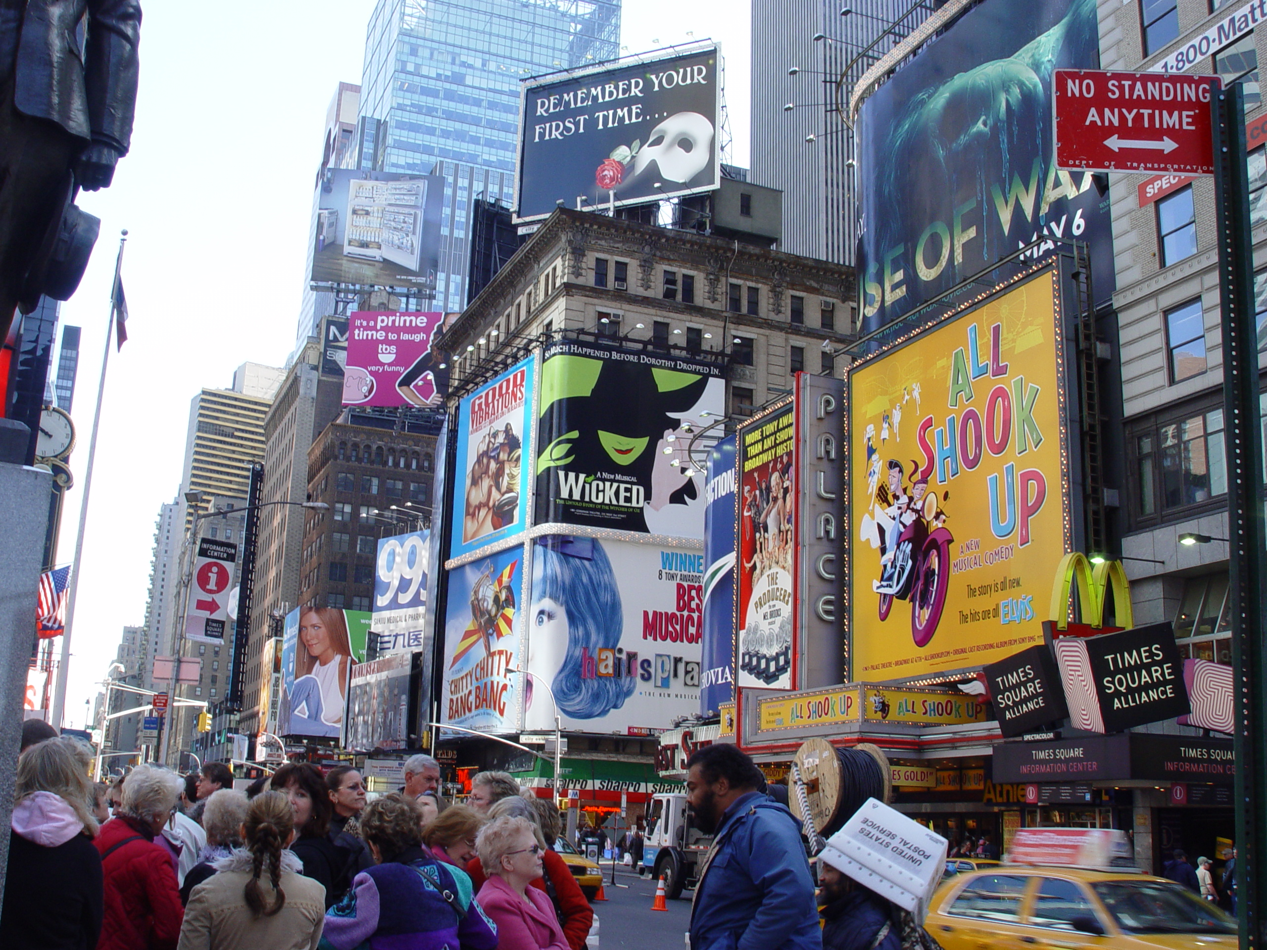 Plakate am Broadway in New York City.